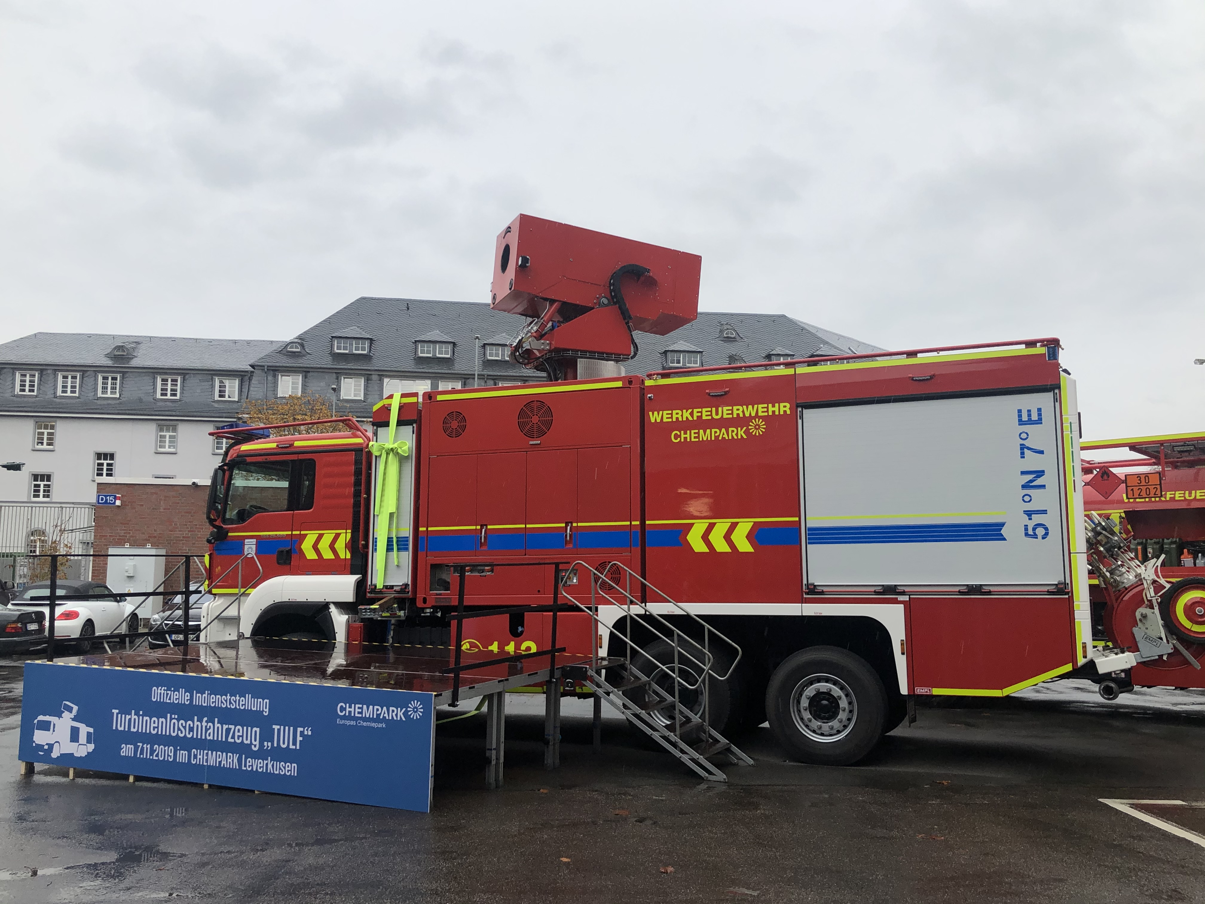 Bild des Turbinenlöschfahrzeugs (TULF) des Chempark Leverkusen bei der Indienststellung